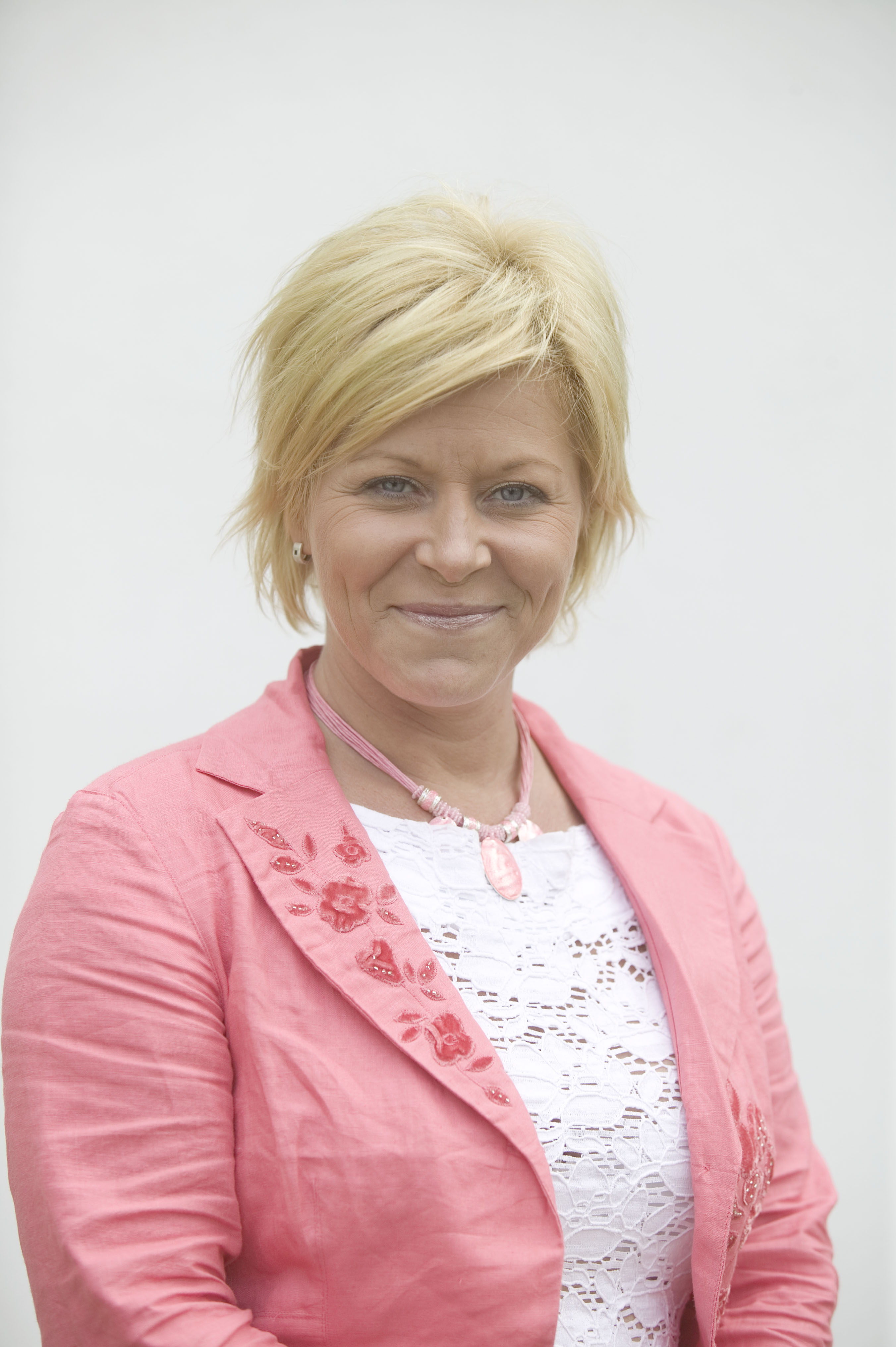 Siv Jensen, FrP-politiker